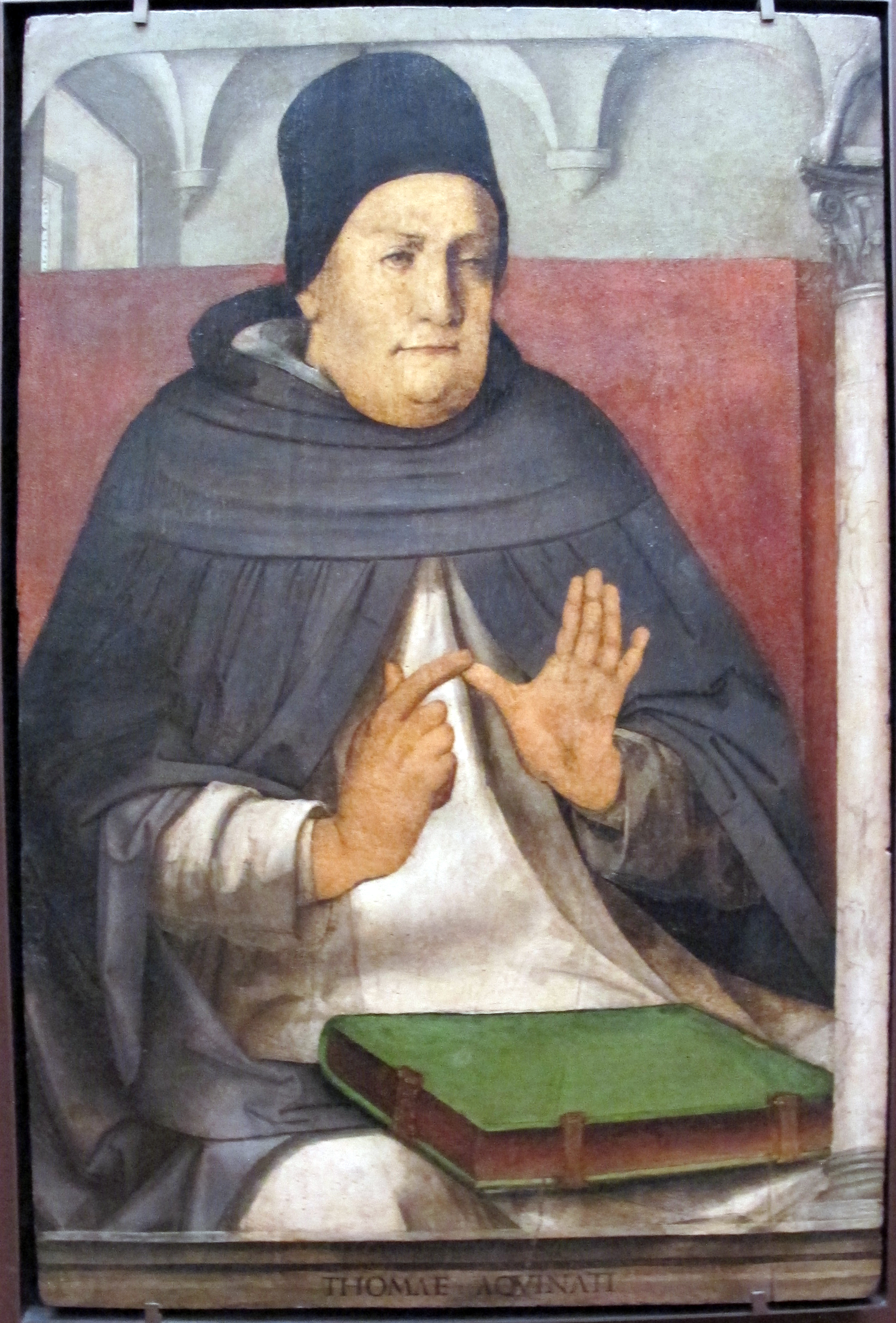 Dipinti fiamminghi del Quattrocento, Louvre, Parigi